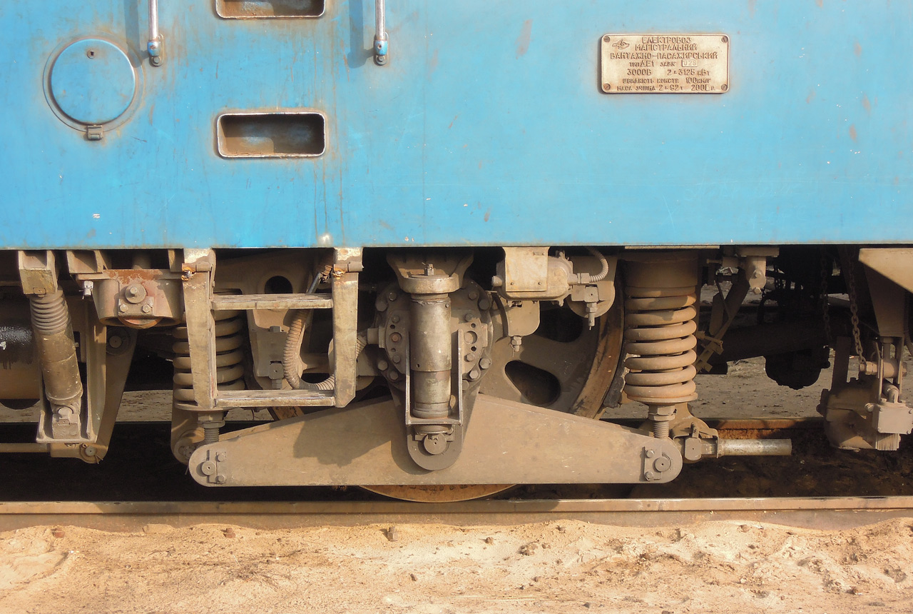 Буксовый узел электровоза ДЭ1, депо Красный Лиман, Украина